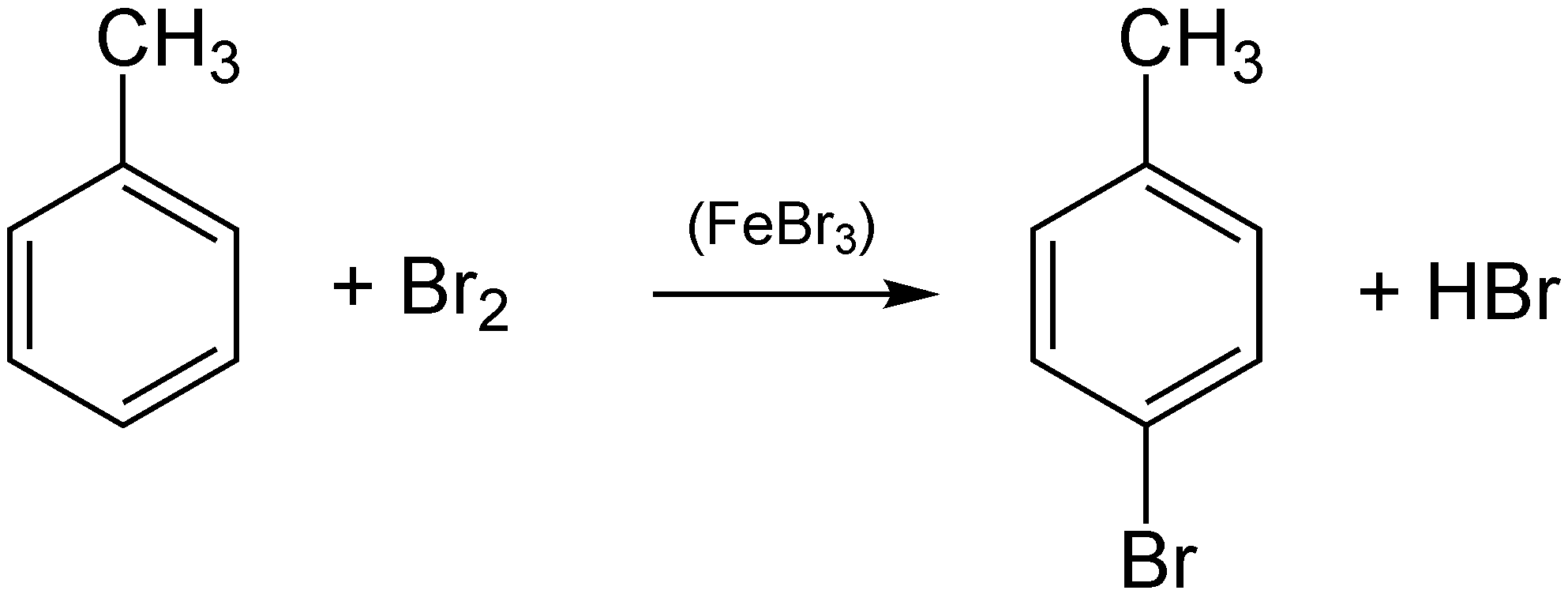 Elektrophile Substitution bei Toluol